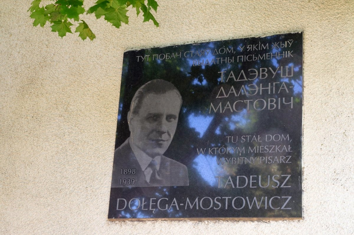 Глыбокае. Тадэвуш Далэнга-Мастовіч